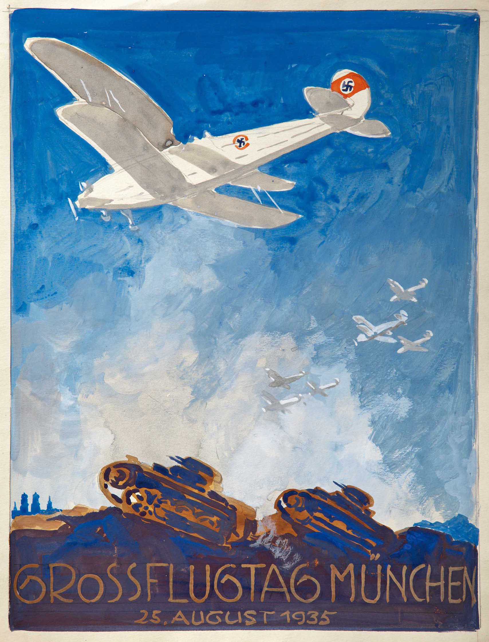 AlbertReich(1881–1942) – Plakat für den Großflugtag München am 25. August 1935